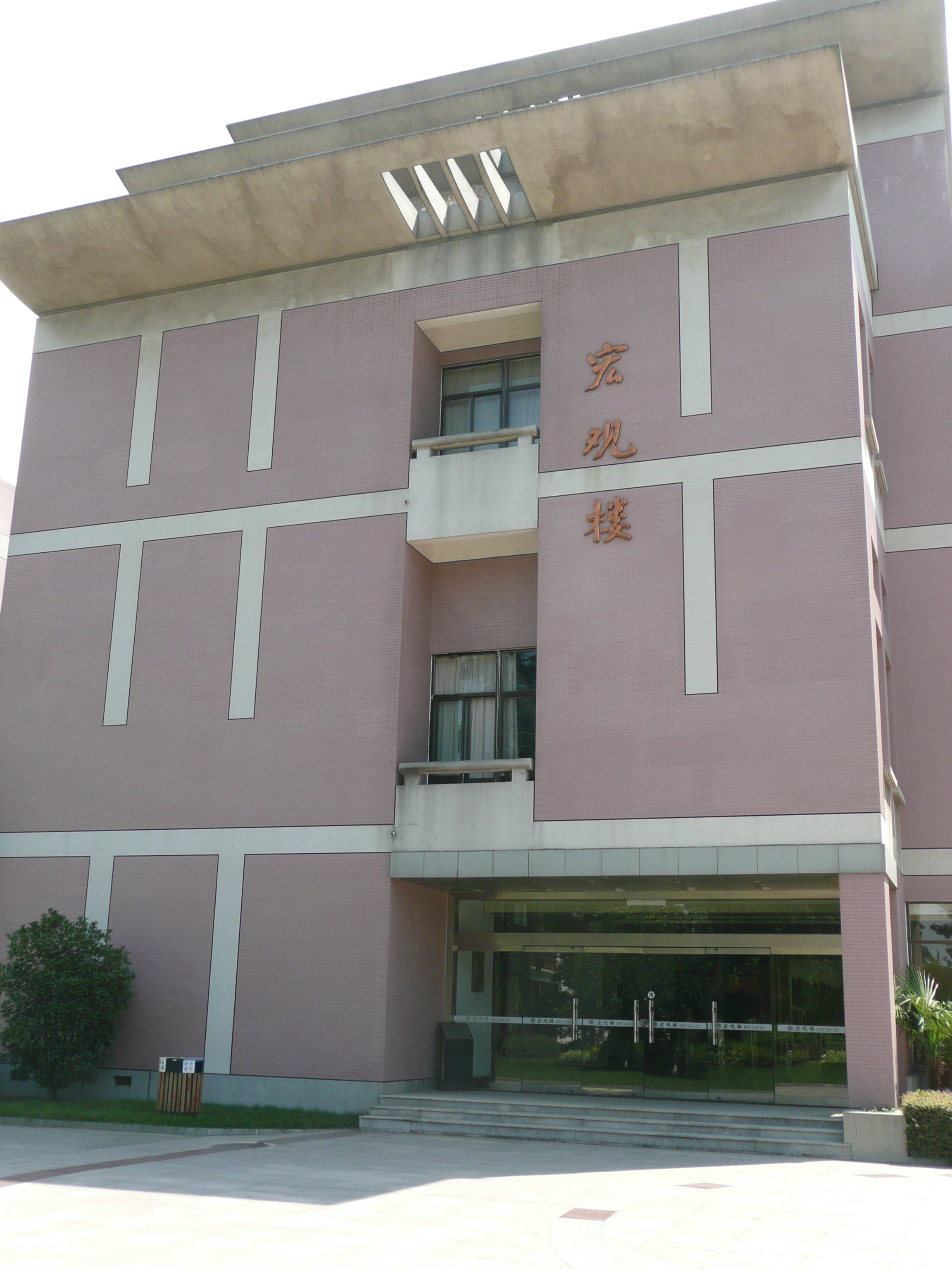 中文（中国大陆）: 江苏省南通中学宏观楼（图书馆）